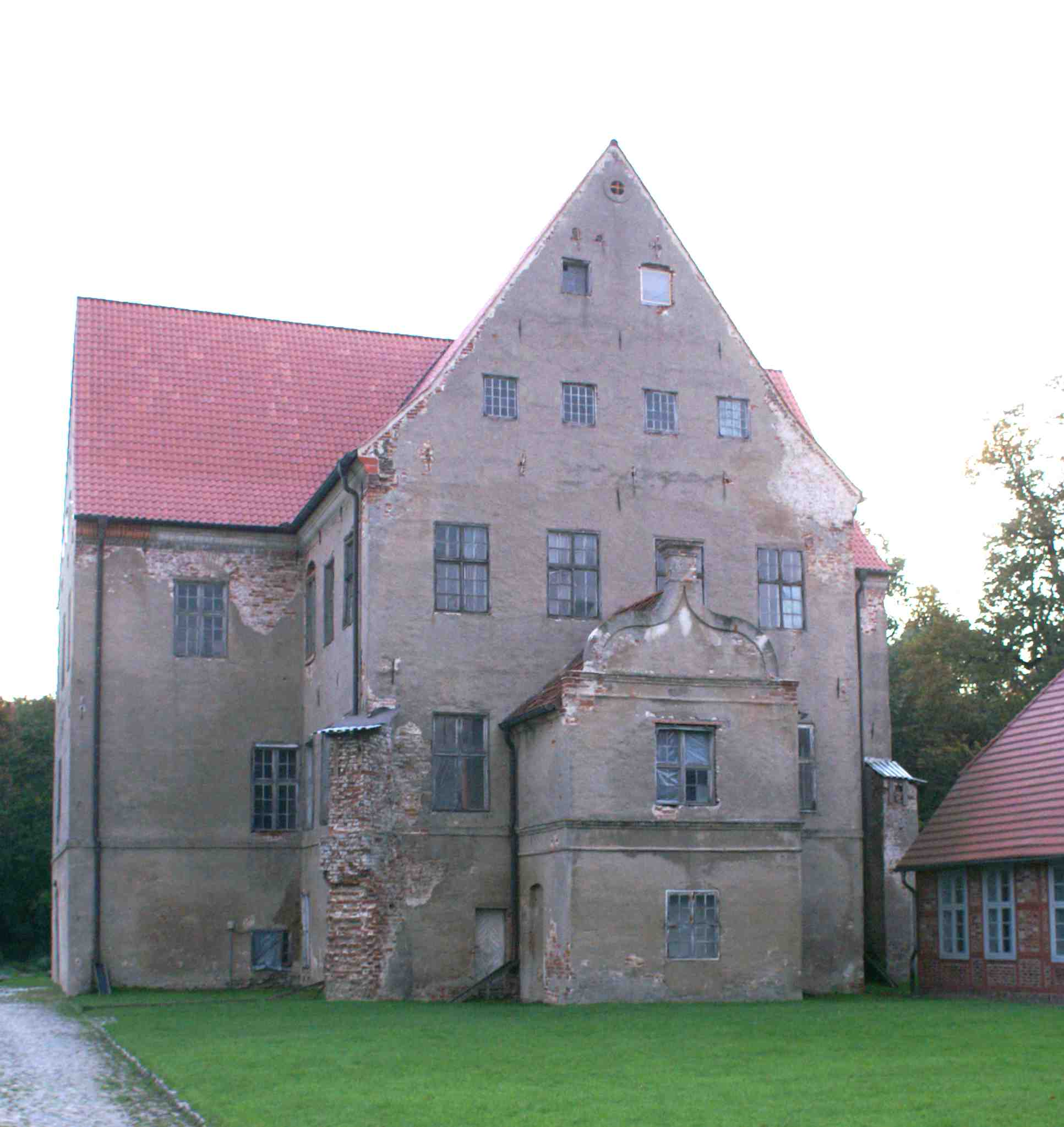 Ludwigsburg - Landkreis Ostvorpommern - Schloss Ludwigsburg, Ostgiebel